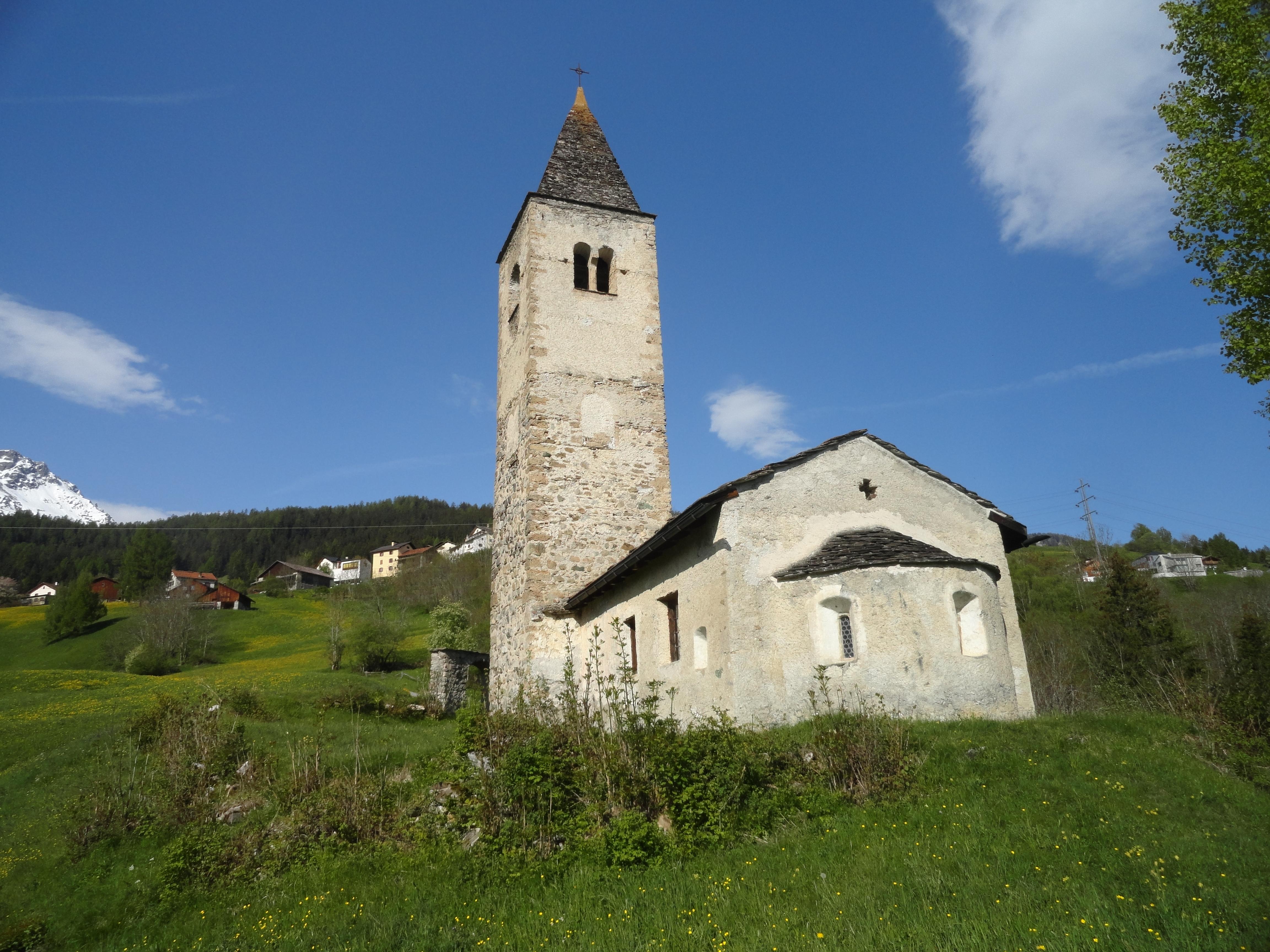 Kirche St. Cosmas und Damian (Mon GR): von Osten